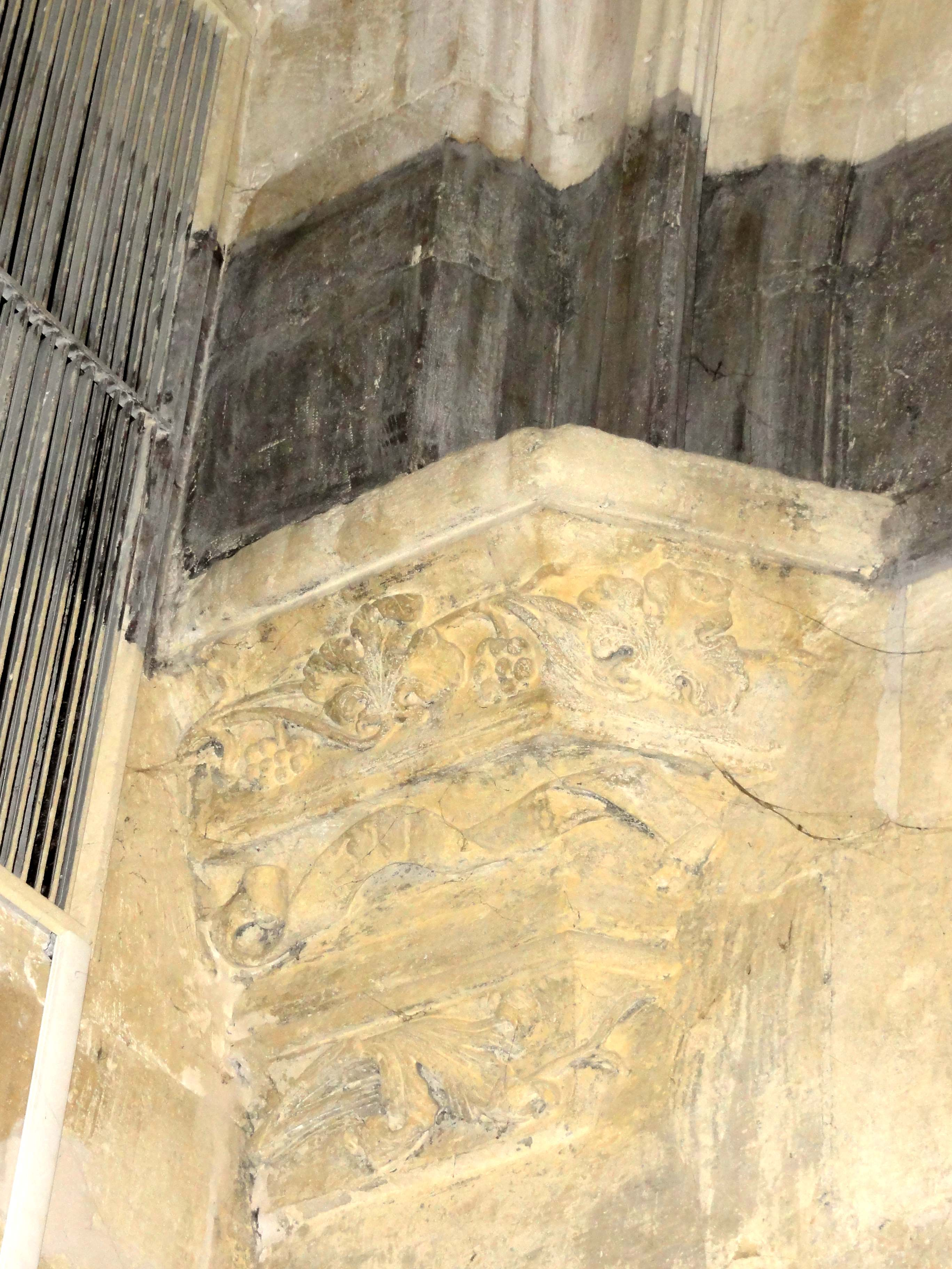 Intérieur de l'église - voir titre.